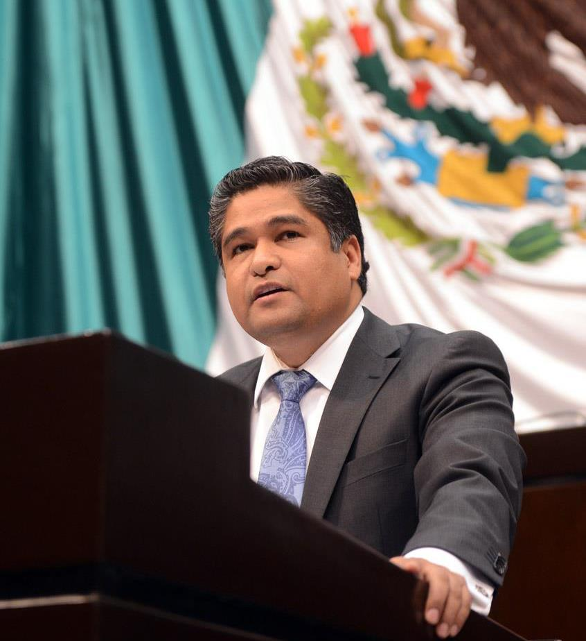 Diputado Federal Distrito 4° del Estado de Nuevo León · Cámara de Diputados - H. Congreso de la Unión